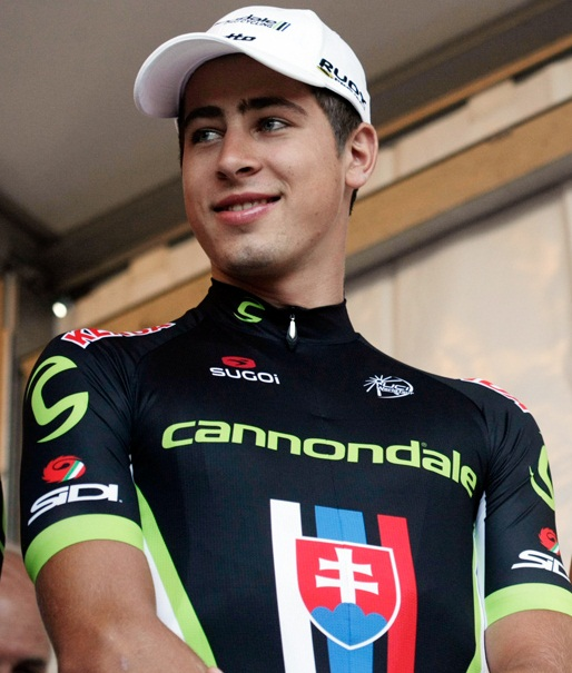 Peter Sagan en la presentación del USA Pro Cycling Challenge 2013